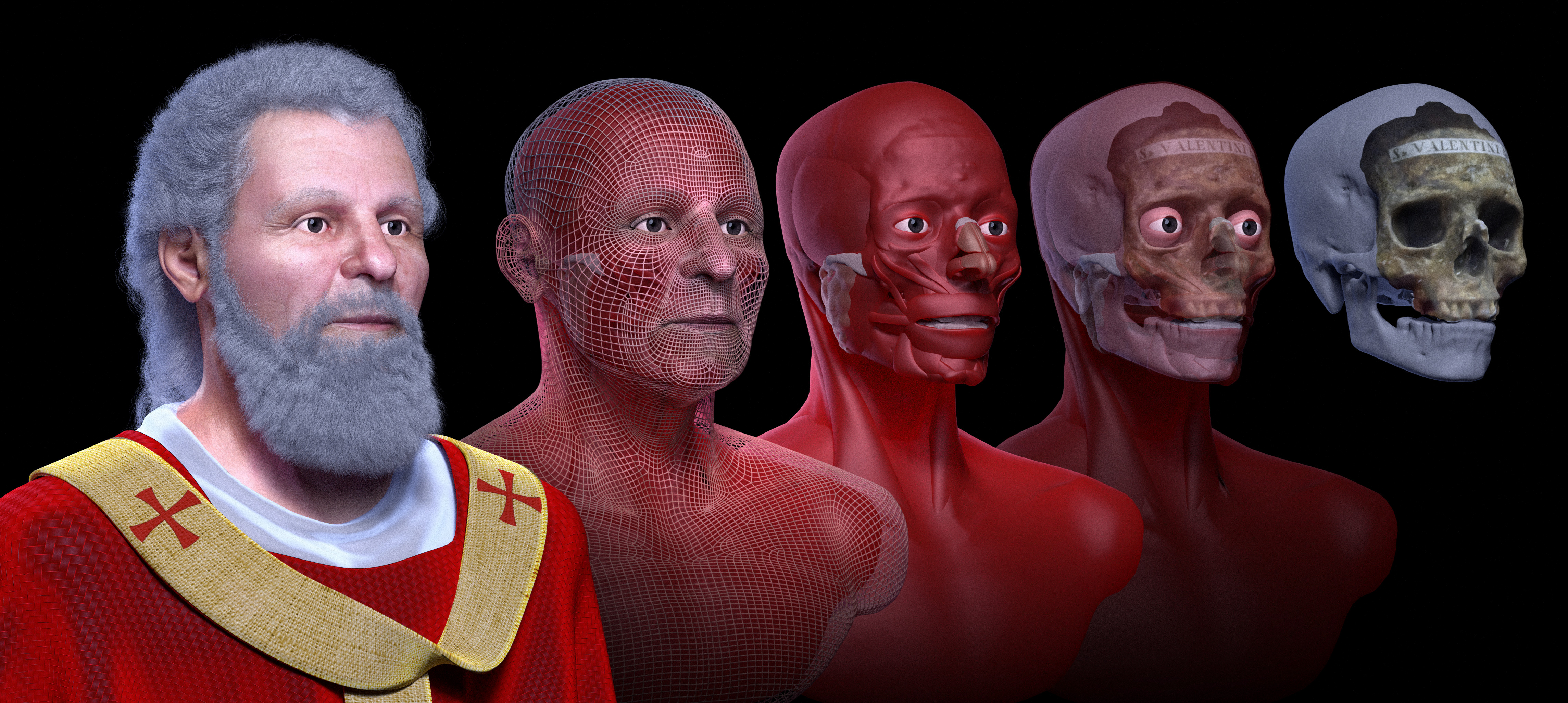 Etapas da reconstrução facial forense de São Valentim. Cícero Moraes, José Luís Lira, ABRHAGI, Santa Maria in Cosmedin, Marcos Paulo Salles Machado.